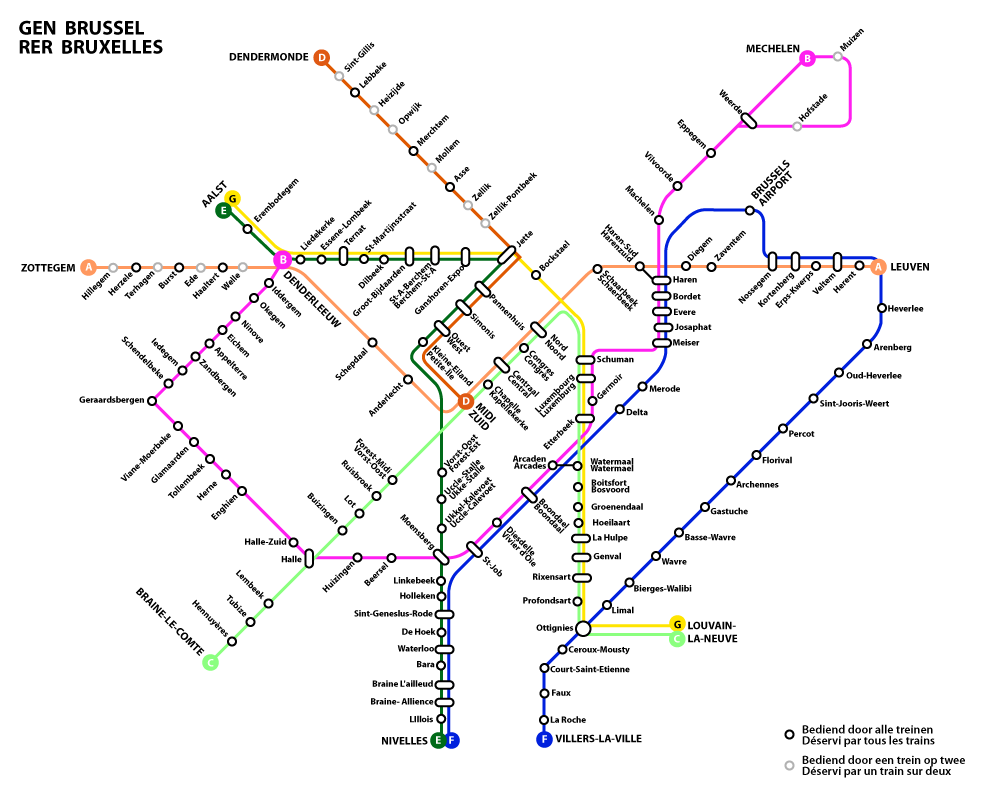 Gewestelijk ExpressNet (GEN Brussel)